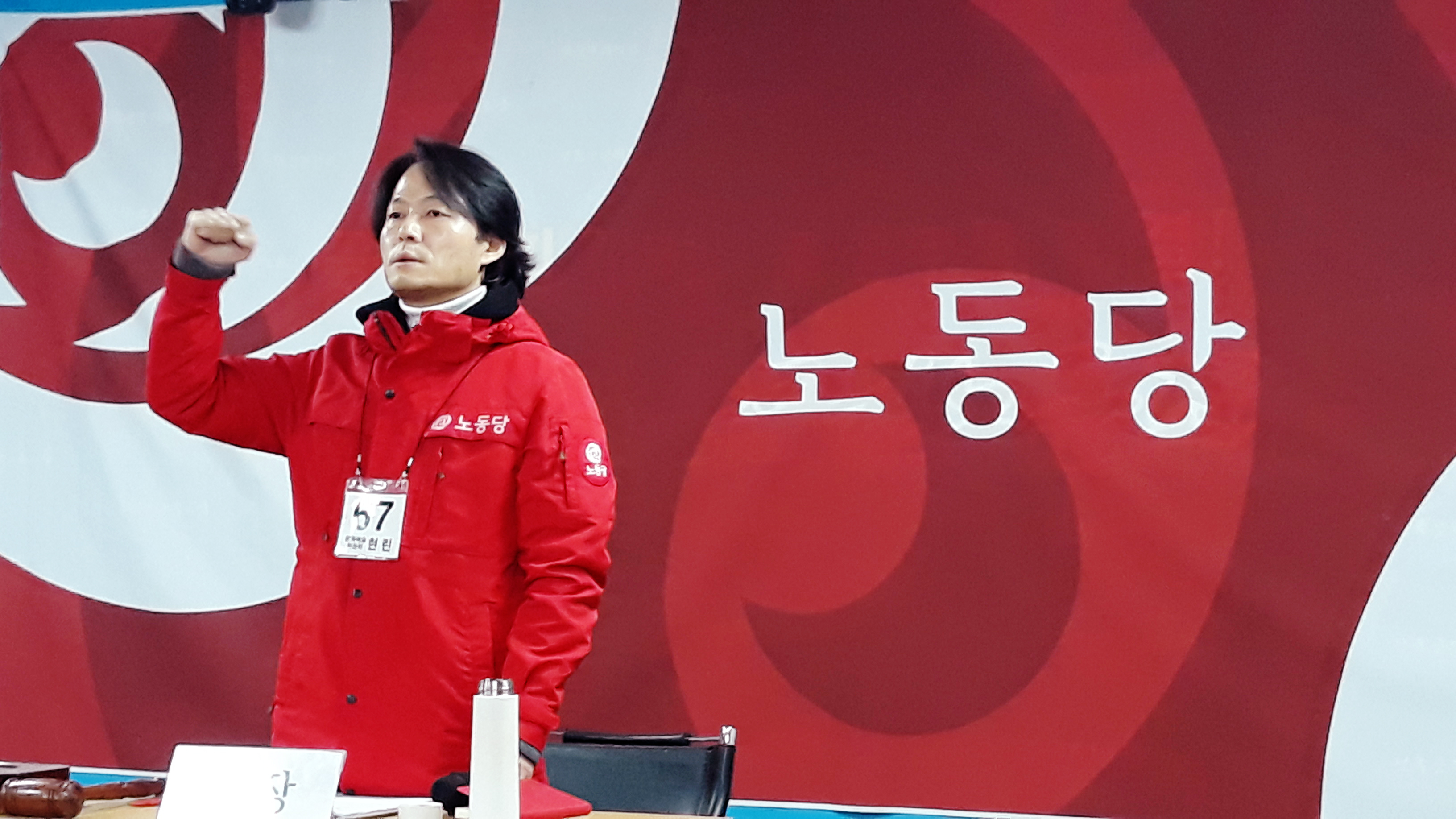 현린, 노동당 6기 7차 전국위원회 2020년 1월 18일, 노동당사